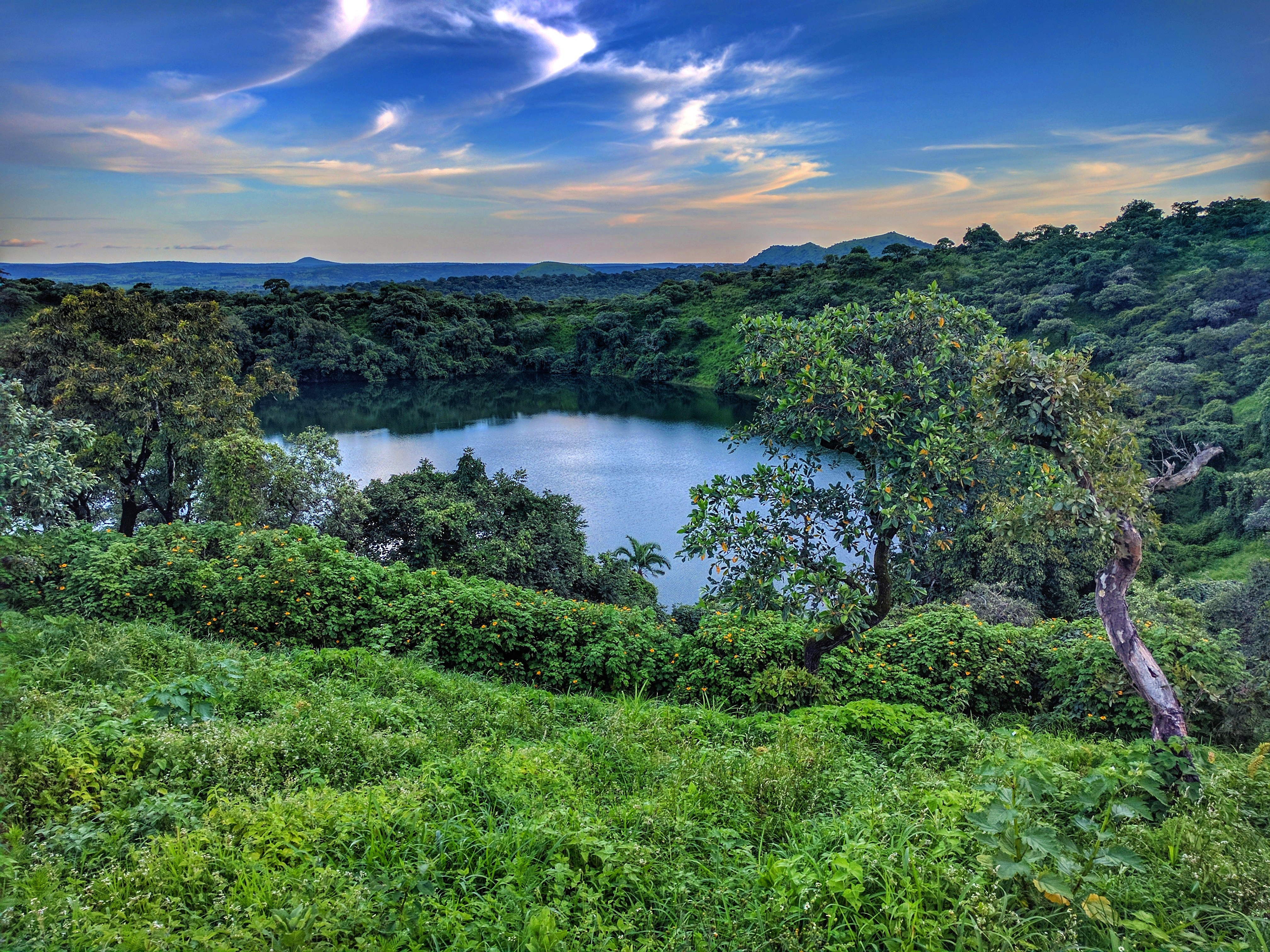 Le lac de cratère de Tizon à Ngaoundéré situé près de la route nationale numéro 3 en venant de Bertoua. Région: Adamaoua